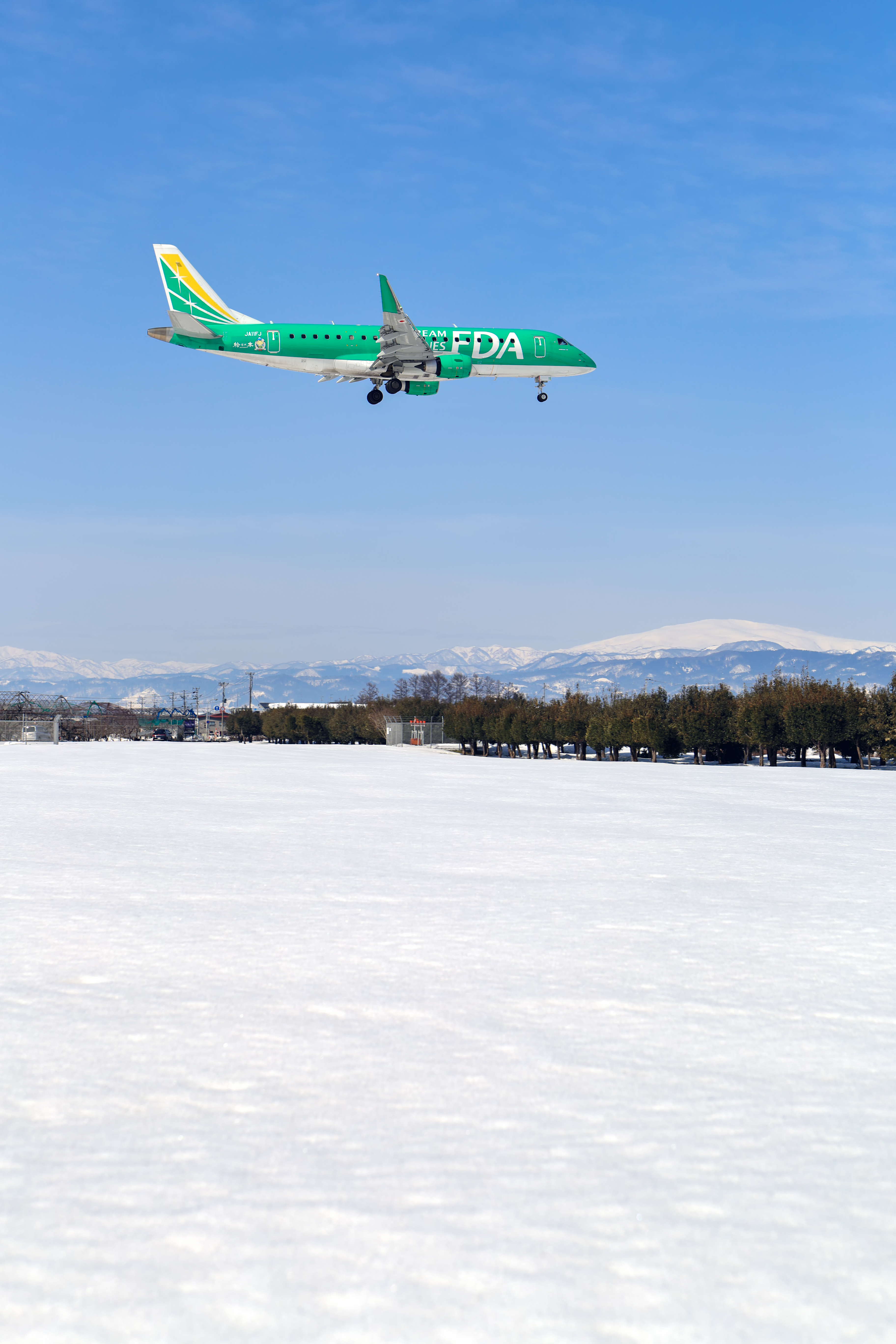 月山を背景に、山形空港へアプローチするFDAのEmbraer 175。